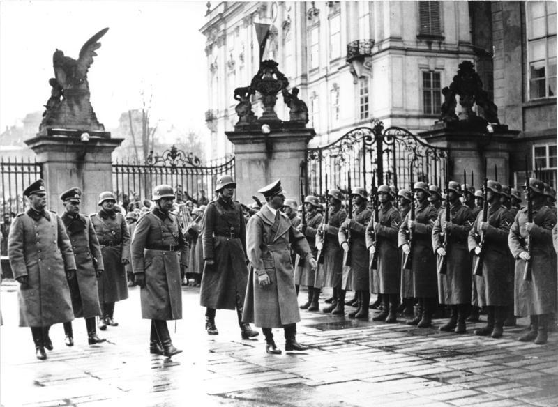 Prag, Burg, Besuch Adolf Hitler Adolf Hitler auf der Prager Burg am 15. März 1939 [Prag.- Adolf Hitler beim Abschreiten einer Ehrenformation] Abgebildete Personen: Hitler, Adolf: Reichskanzler, Deutschland